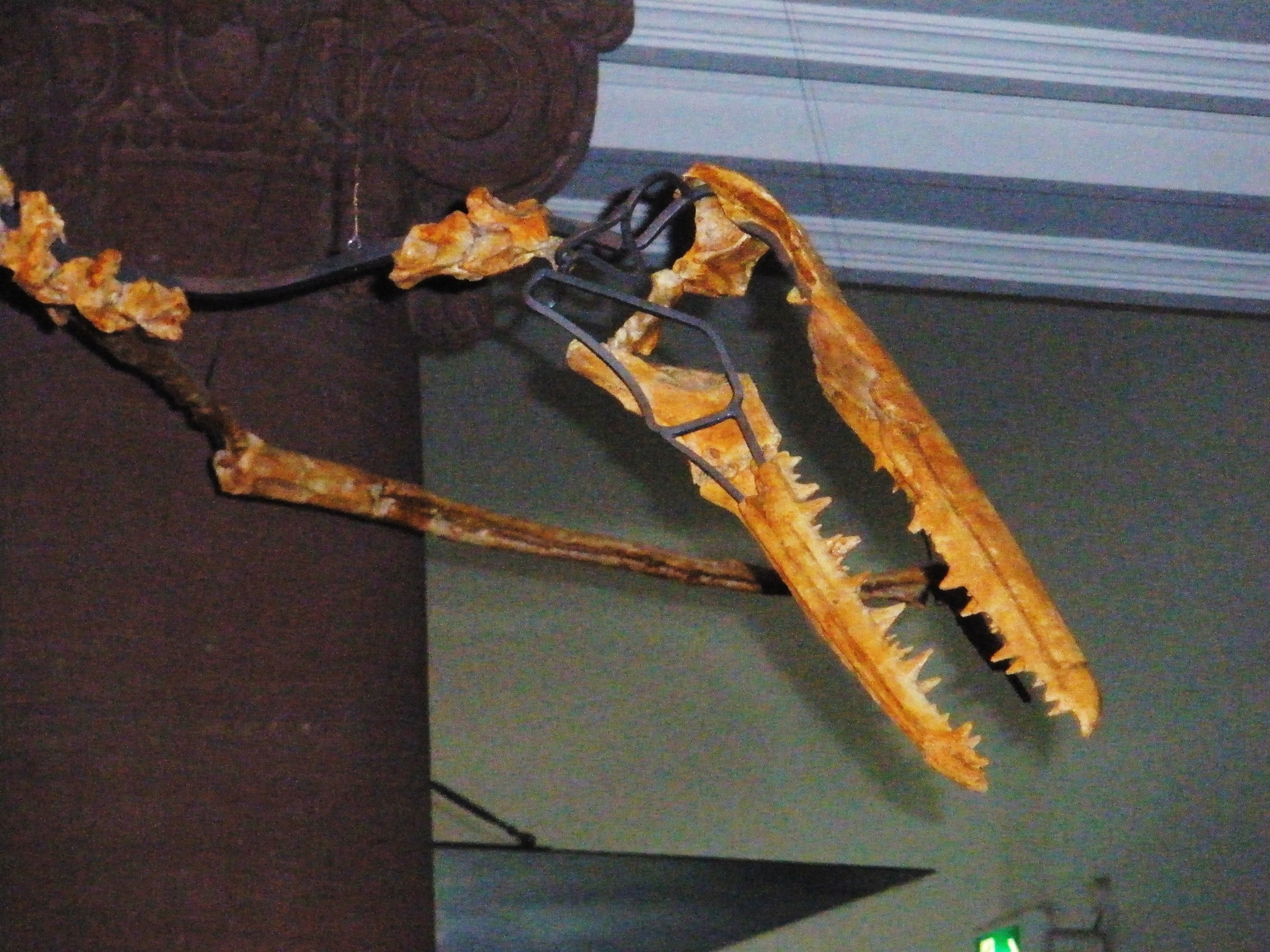 Fossil of Pelagornis, an extinct bird- Took the photo at Senckenberg Museum of Frankfurt